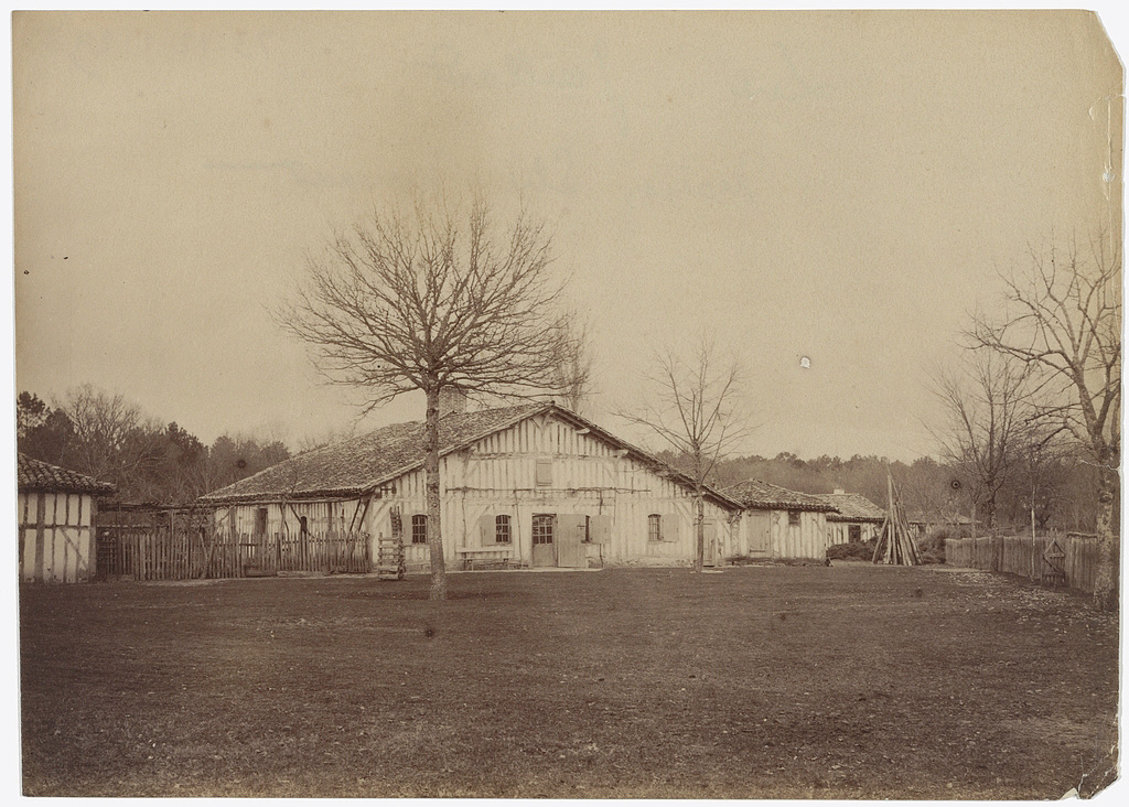 Reproduction numérique d'une photographie de Félix Arnaudin figurant une maison landaise vers le Muret vers 1907(13 x 18 cm).